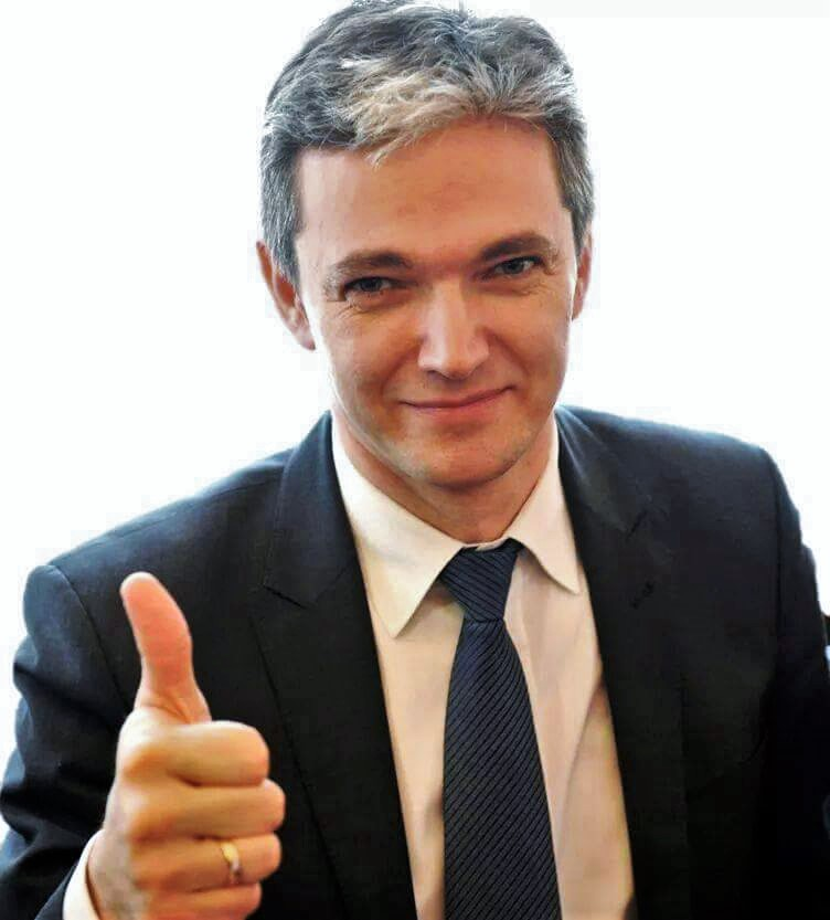 Marszałek Adam Jarubas